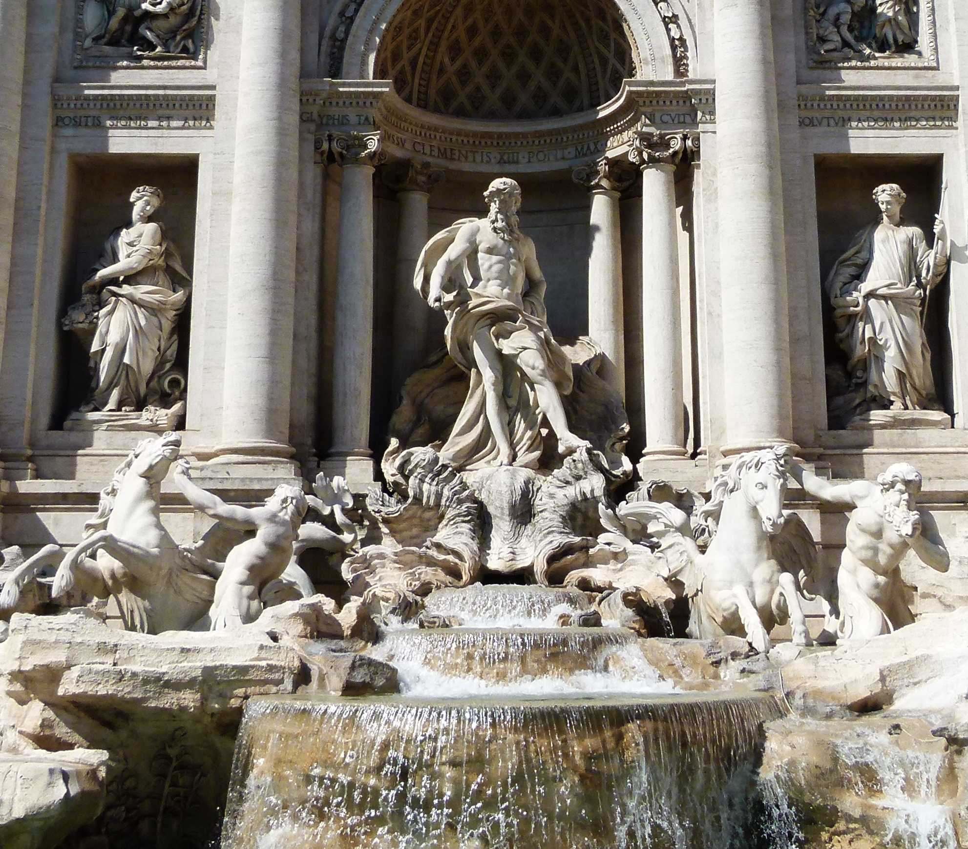 Fontaine de Trevi, l'Océan jaillit de sa niche, juché sur un char tiré par deux chevaux marins et deux tritons